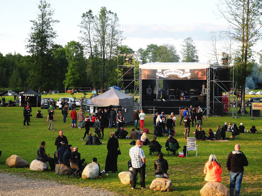 Muusikafestivali Amme Rock 2017 lava ja külastajad.